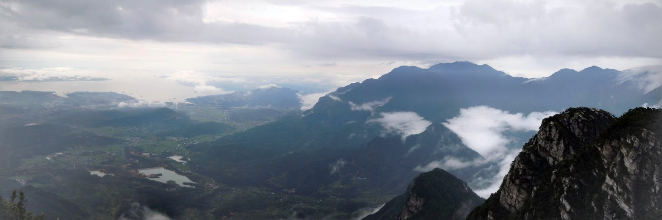 由庐山含鄱口远眺鄱阳湖